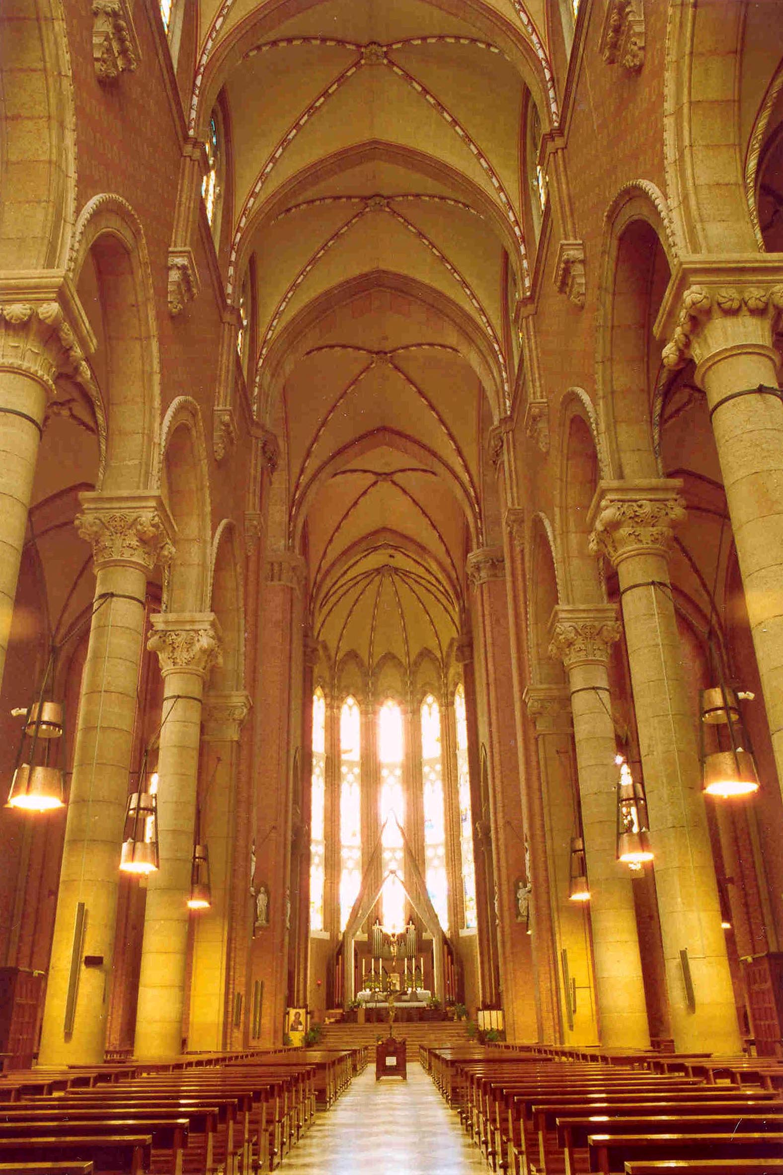 Foto dell'interno del Duomo di Montebelluna, scattata da me, Riccardo Lelli, che ne concedo l'uso a Wikipedia